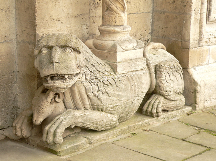 Eingang Kaiserdom Königslutter